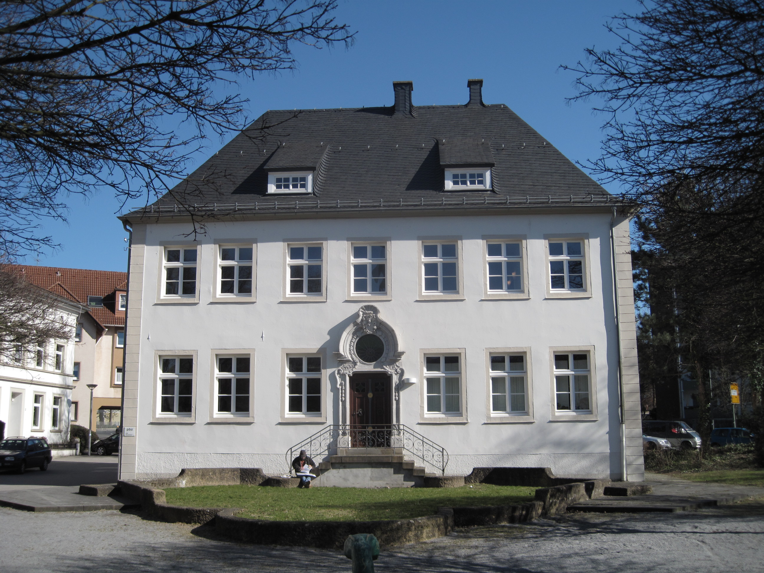 An der Schlacht 14 (früher Stadtarchiv) in Iserlohn. Denkmalschutz seit 20. Juni 1983.